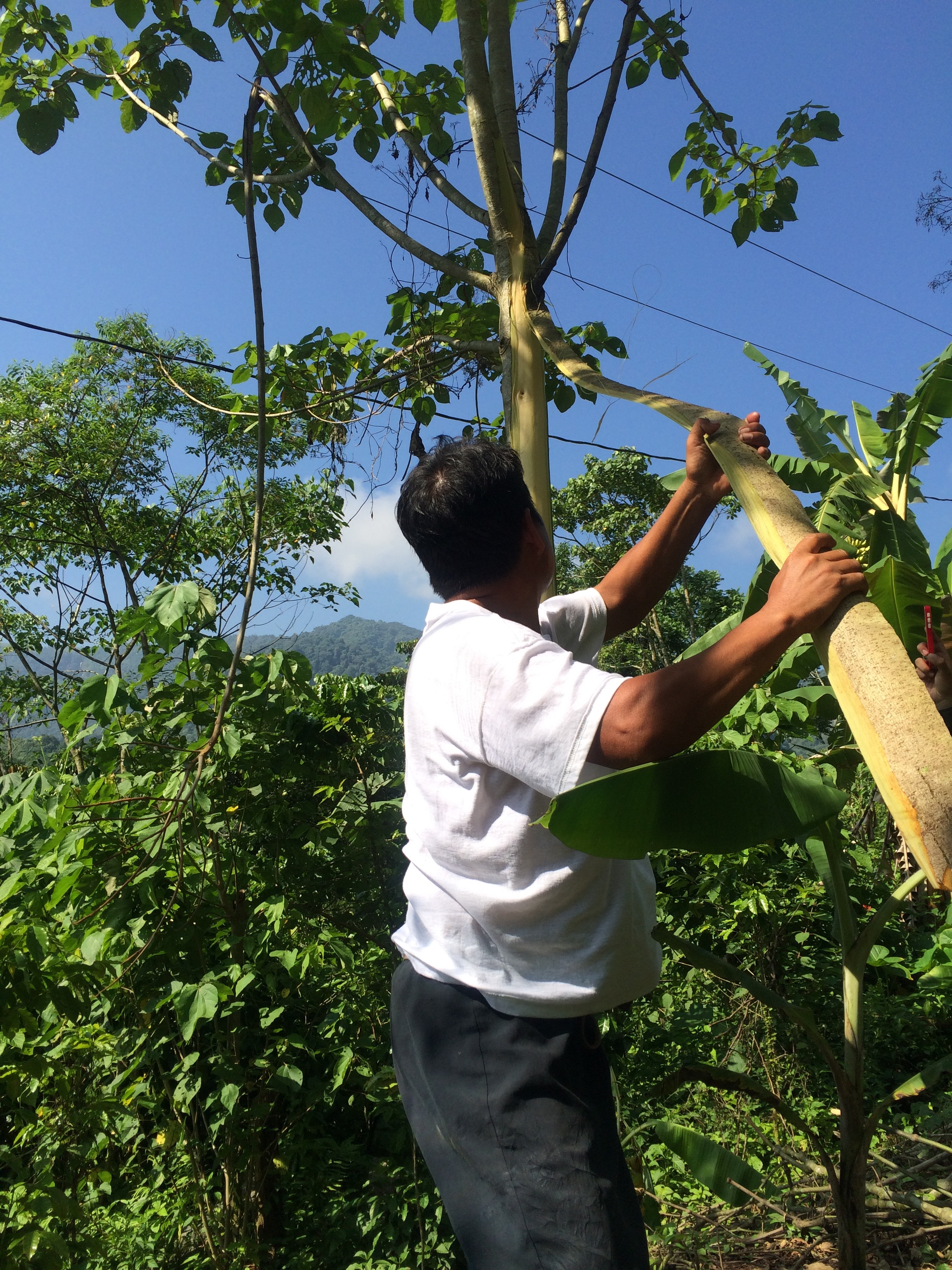 Artesanos de la comunidad El Tozán, en el municipio de Jonotla, ubicado en la Sierra Nororiental de Puebla, extraen la fibra del Jonote.